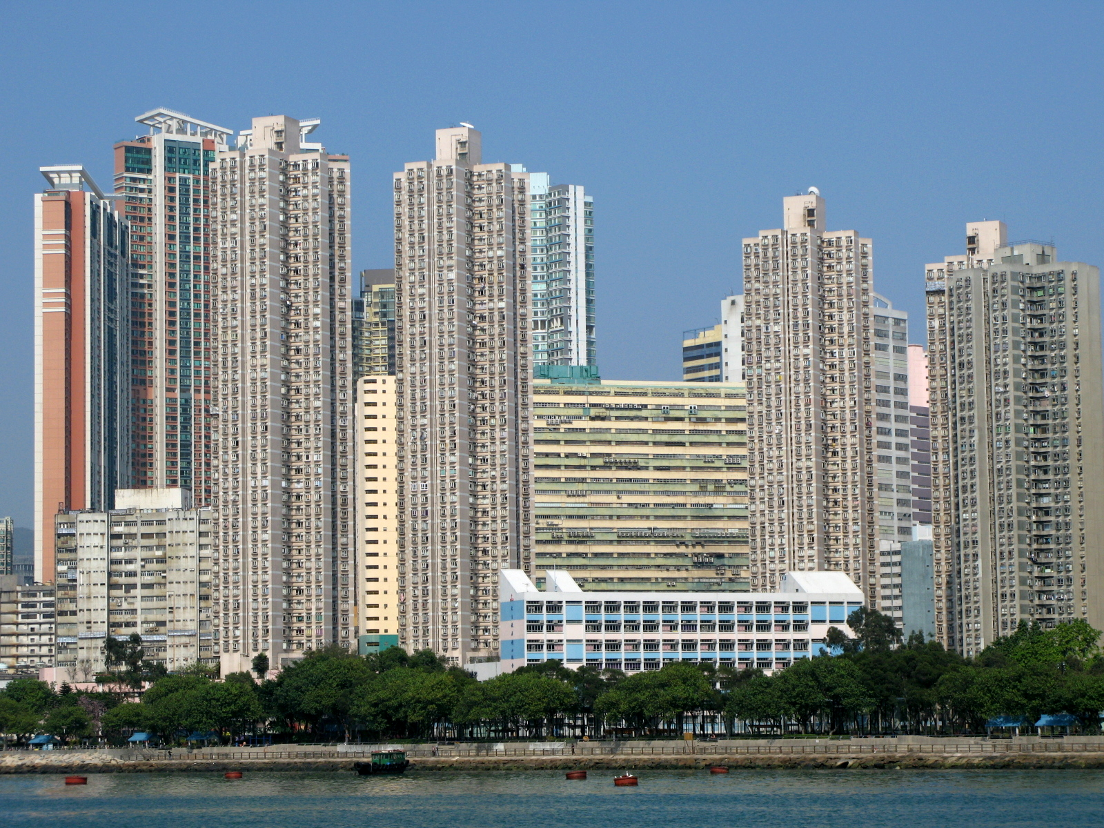 HK Waterside Plaza in Tsuen Wan